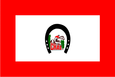 Bandera del Club Hípico Astur